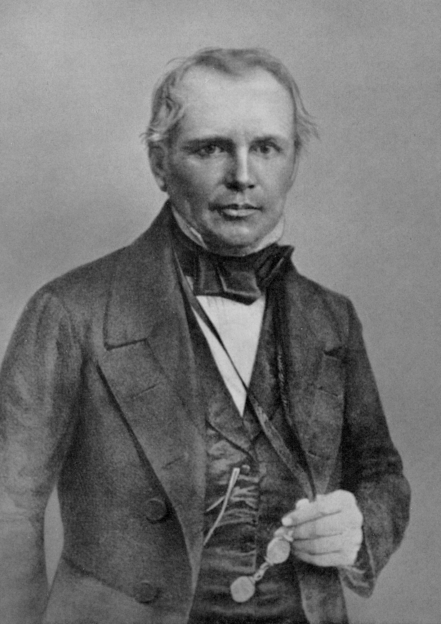 Étienne-Paschal Taché (1895-1865)